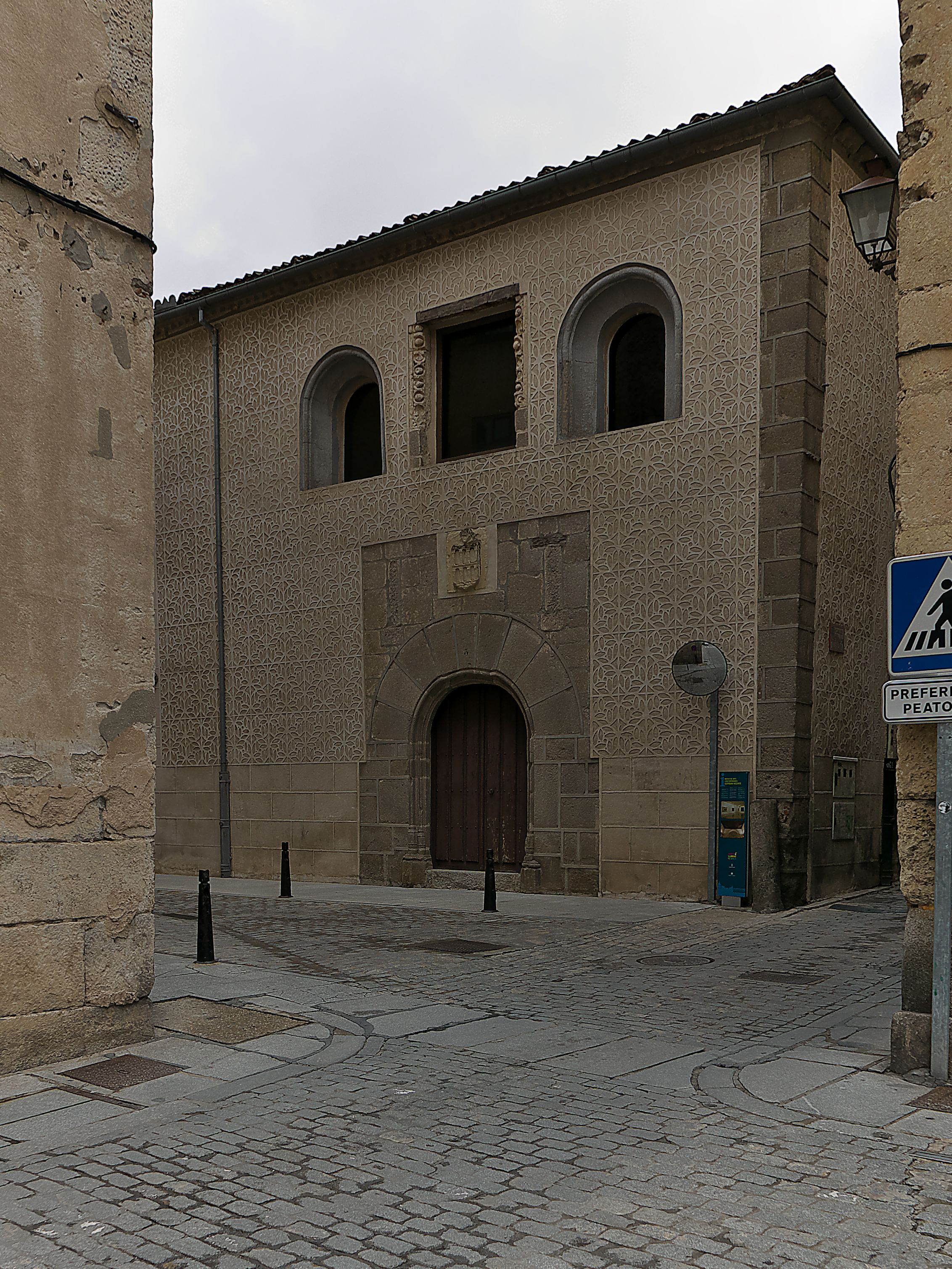 Residencia de Enrique IV en Segovia.El rey dispuso de esta otra estancia, además de la suya en el Alcázar.